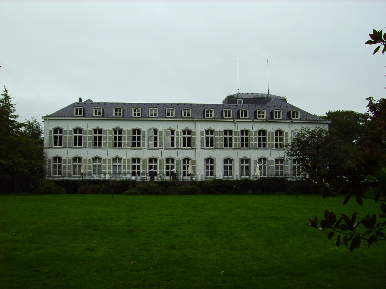 Terrasse (Rückseite) von Schloss Rahe in Aachen Laurensberg. Eigene Aufnahme am Tag des Denkmals 12. September 2010.